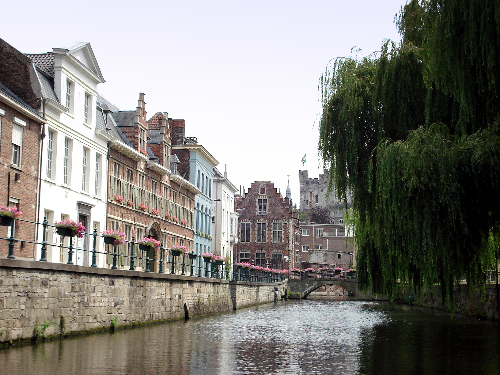 Gent: Lievekanaal met Augustijnenkaai (links op foto), Lievebrug (achtergrond) en Lievekaai (rechts, weinig zichtbaar). Verderop, meestentoren van Gravensteen, en links hiervan, spits van belfort met draak.